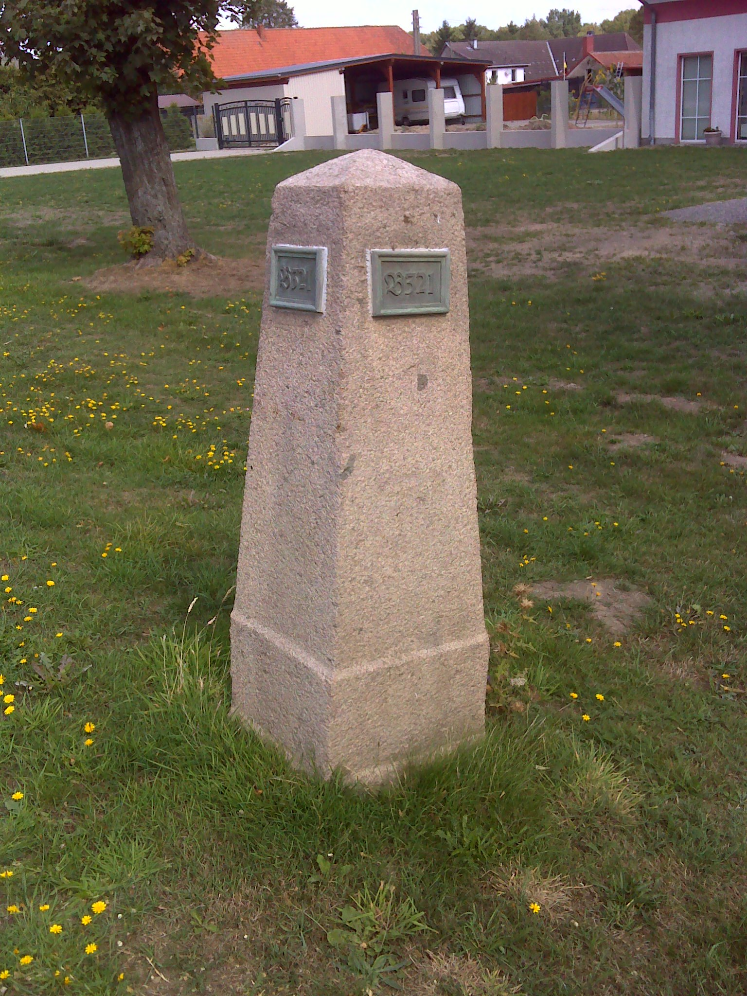 Mecklenburg-Schweriner Ganzmeilenstein in TessenowThis is a photograph of an architectural monument.